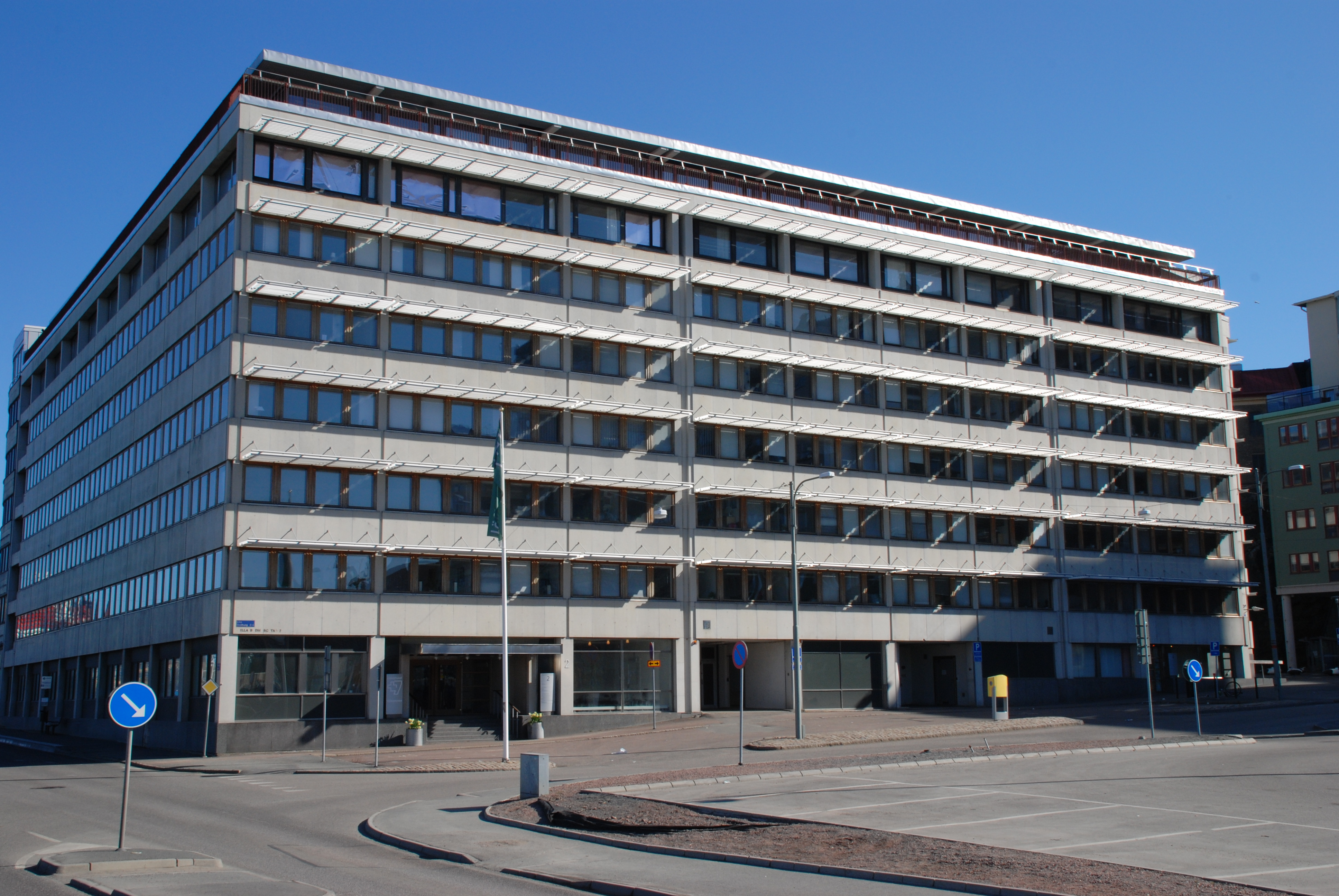 Lilla Badhusgatan i Göteborg sedd från Skeppsbron. Uppfört 1965 för Bröderna Kanolds räkning. Lund & Valentin var arkitekter.